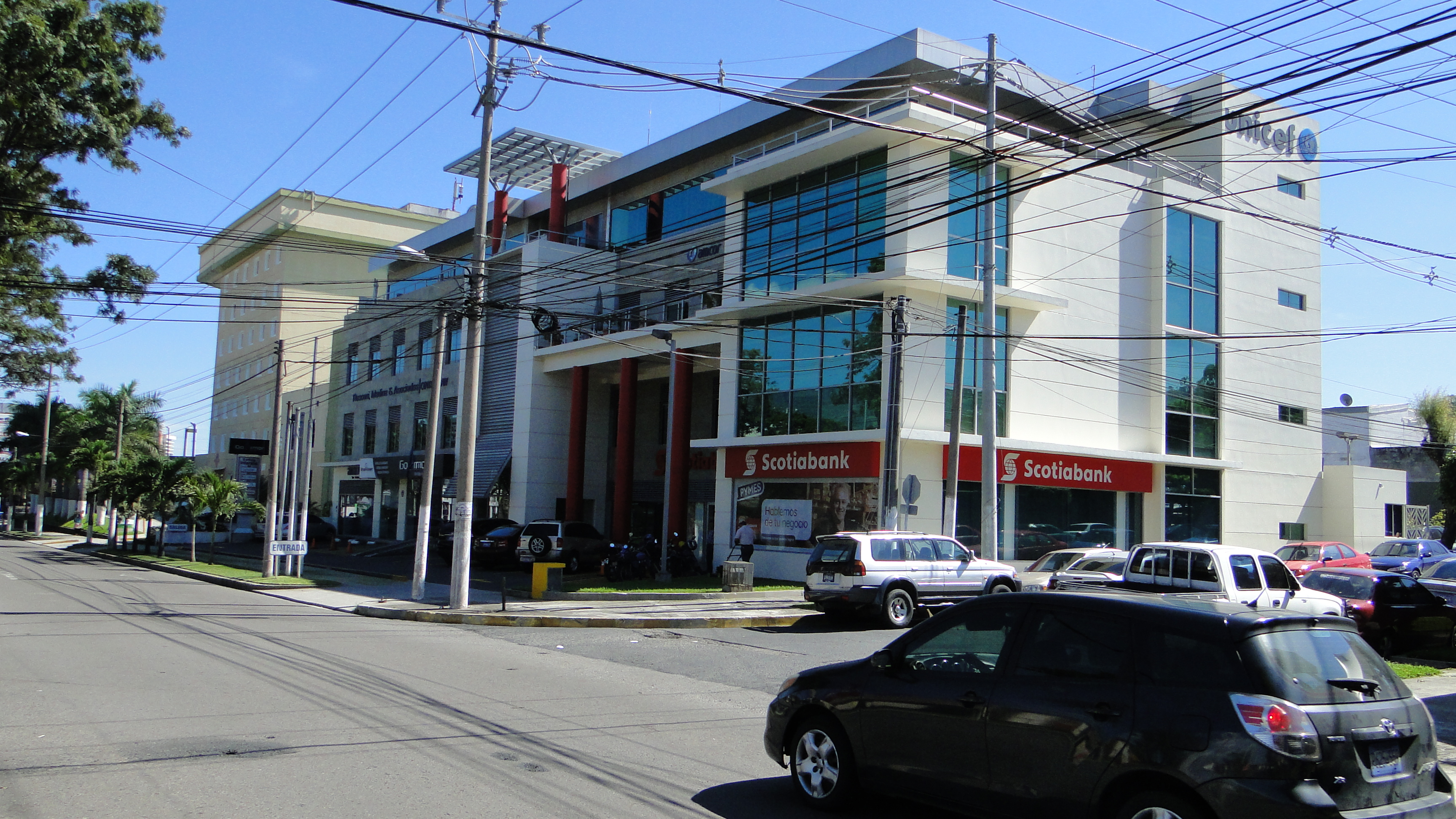 Lateral del Edificio Interalia, Blvd. Santa Elena, calle Alegria,local 1-C, Municipio de Antiguo Cuscatlán, Departamento de La Libertad, El Salvador.